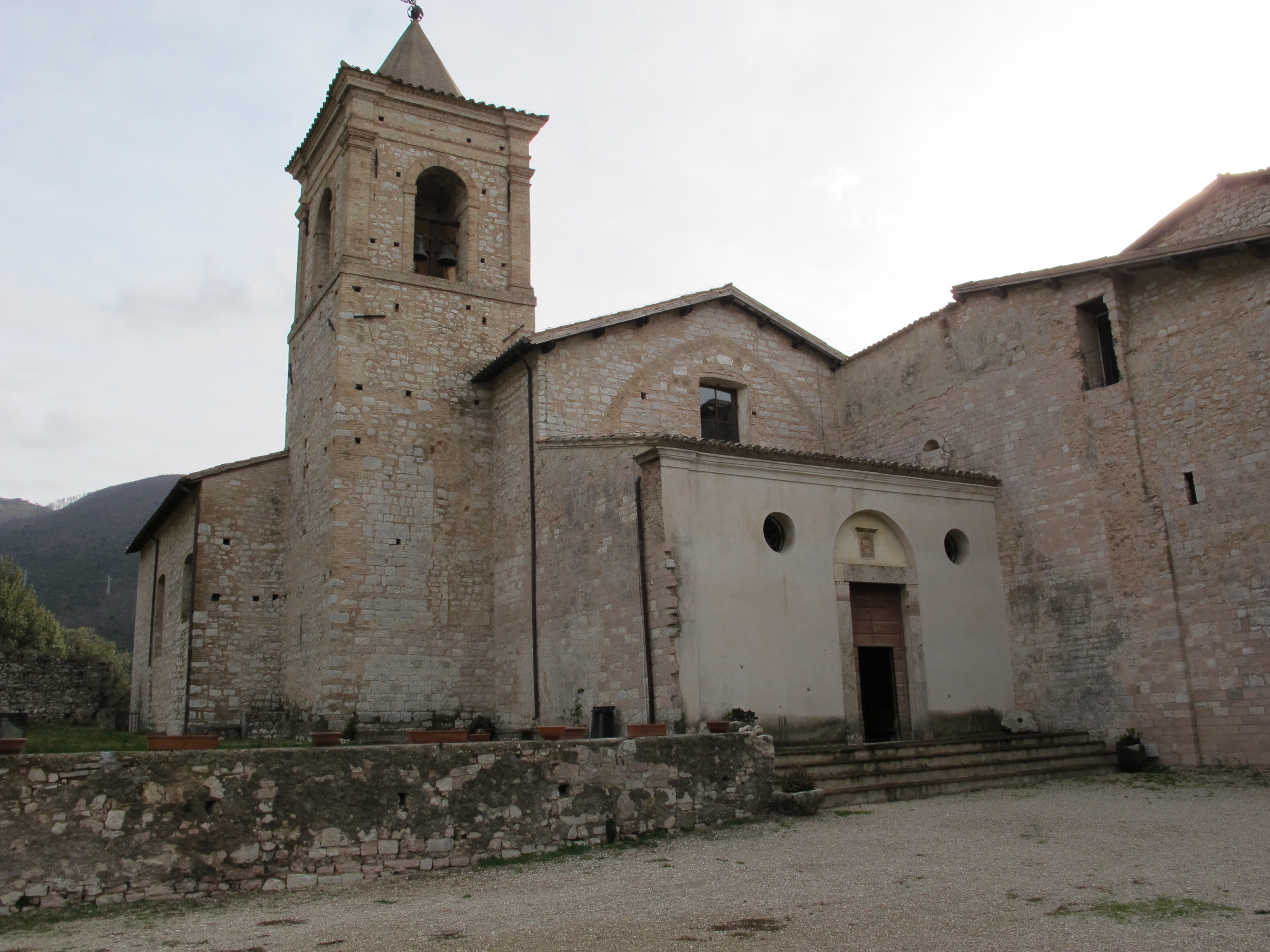 Abbazia di sassovivo